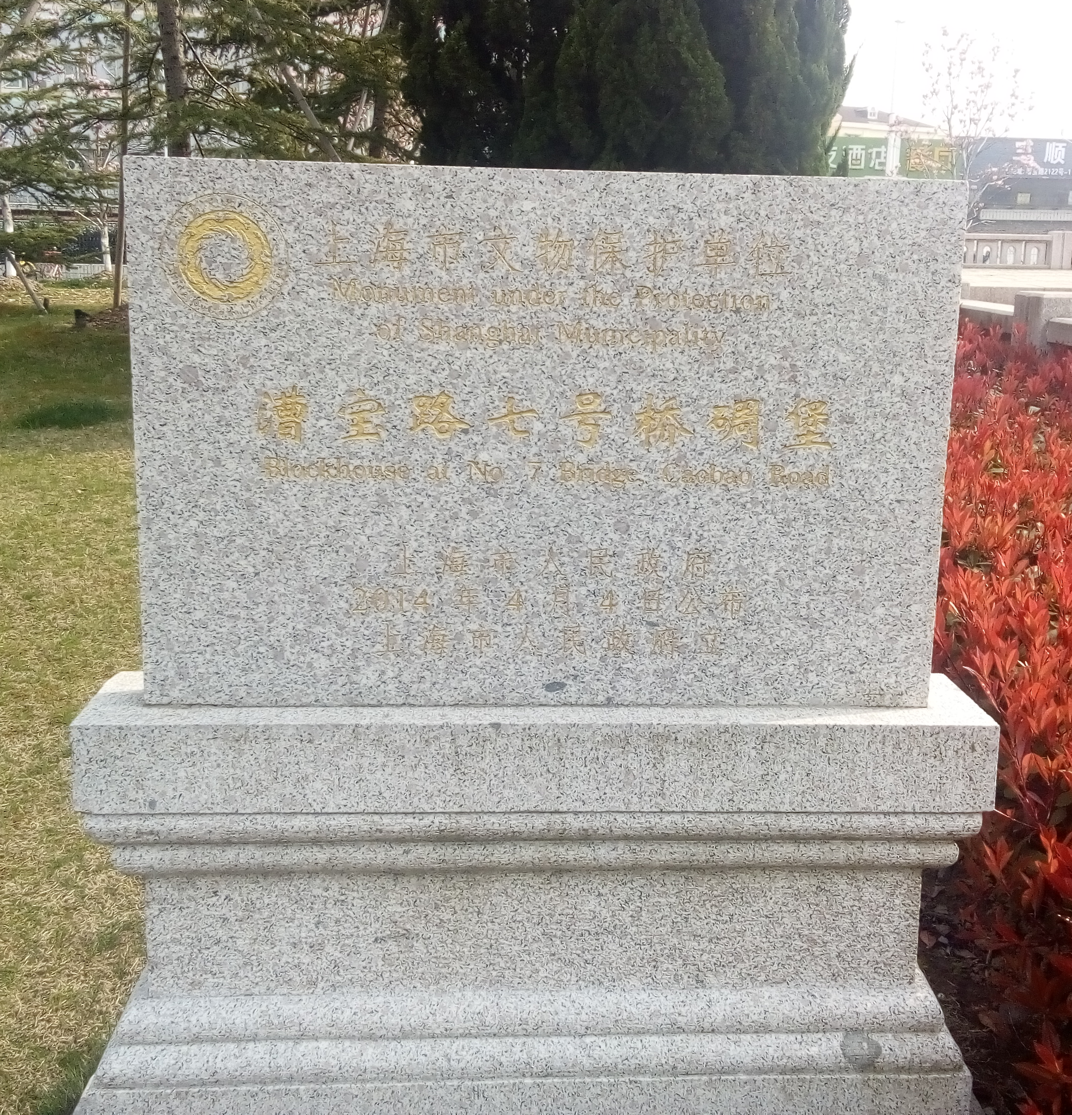 中文（中国大陆）: 漕宝路七号桥碉堡市级文物保护单位铭牌（上海市人民政府、上海市文物局）